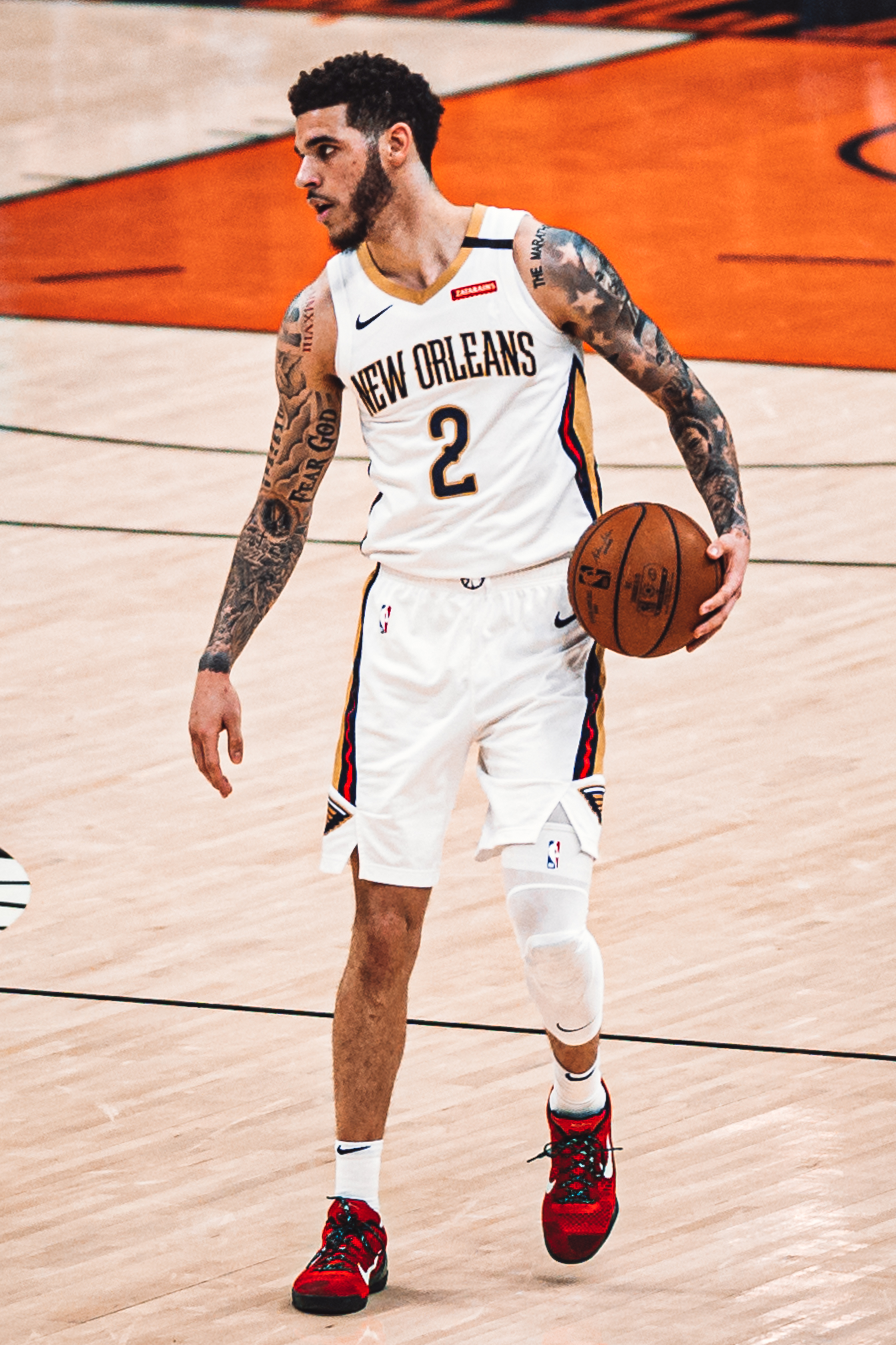 Lonzo Ball